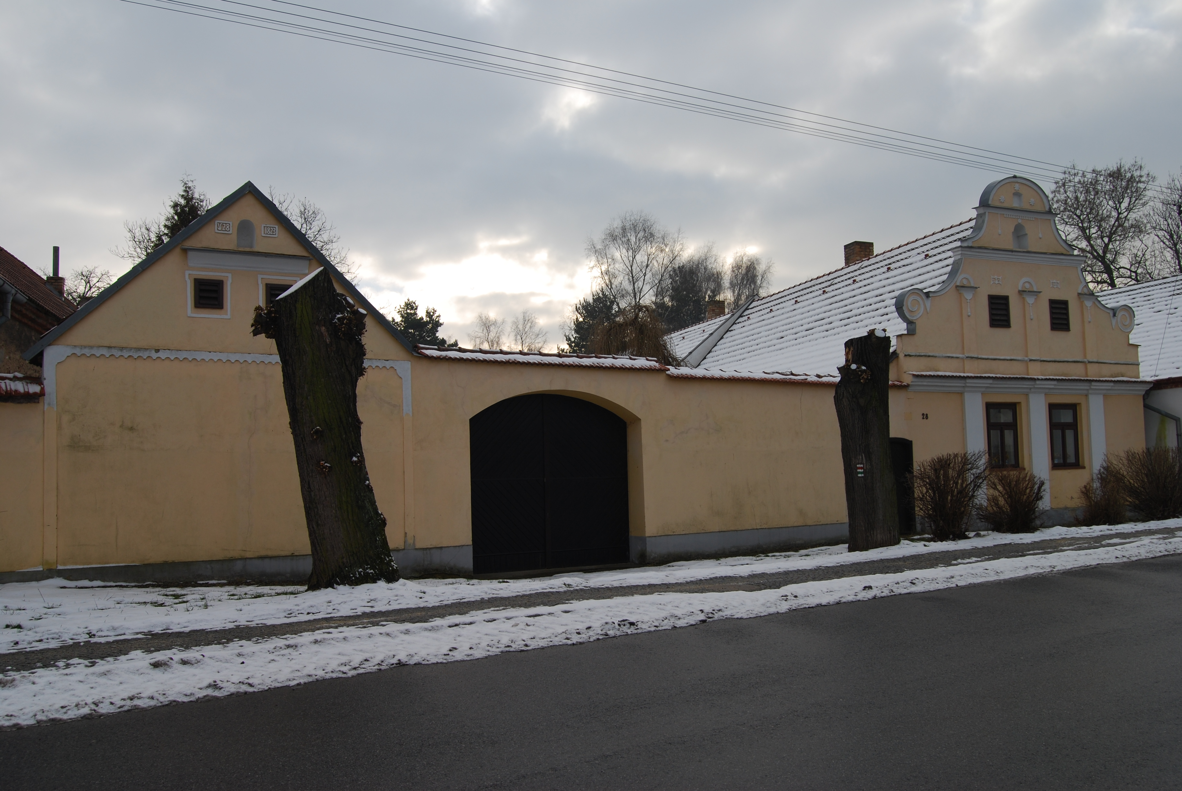 Venkovská usedlost čp.28. Albrechtice nad Vltavou. Okres Písek. Česká republika.